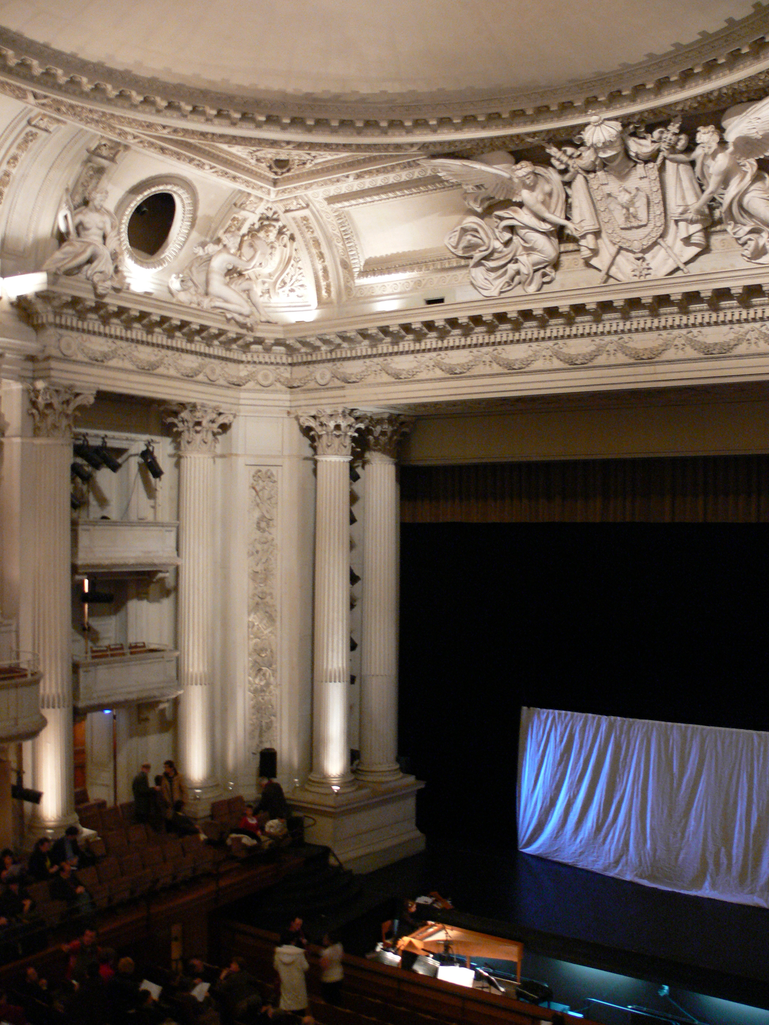 Compiègne, France: Théâtre Impérial de Compiègne